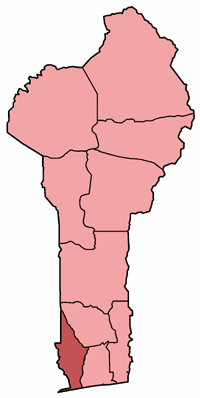 Mappa della diocesi di Lokossa, nel Bénin. Lavoro personale, eseguito a partire da questa immagine di Commons. Fonte per i confini delle diocesi: Guida delle missioni cattoliche 2005, a cura della Congregatio pro gentium evangelizatione, Roma, Urbaniana University Press, 2005. Categoria:Chiesa cattolica in Benin